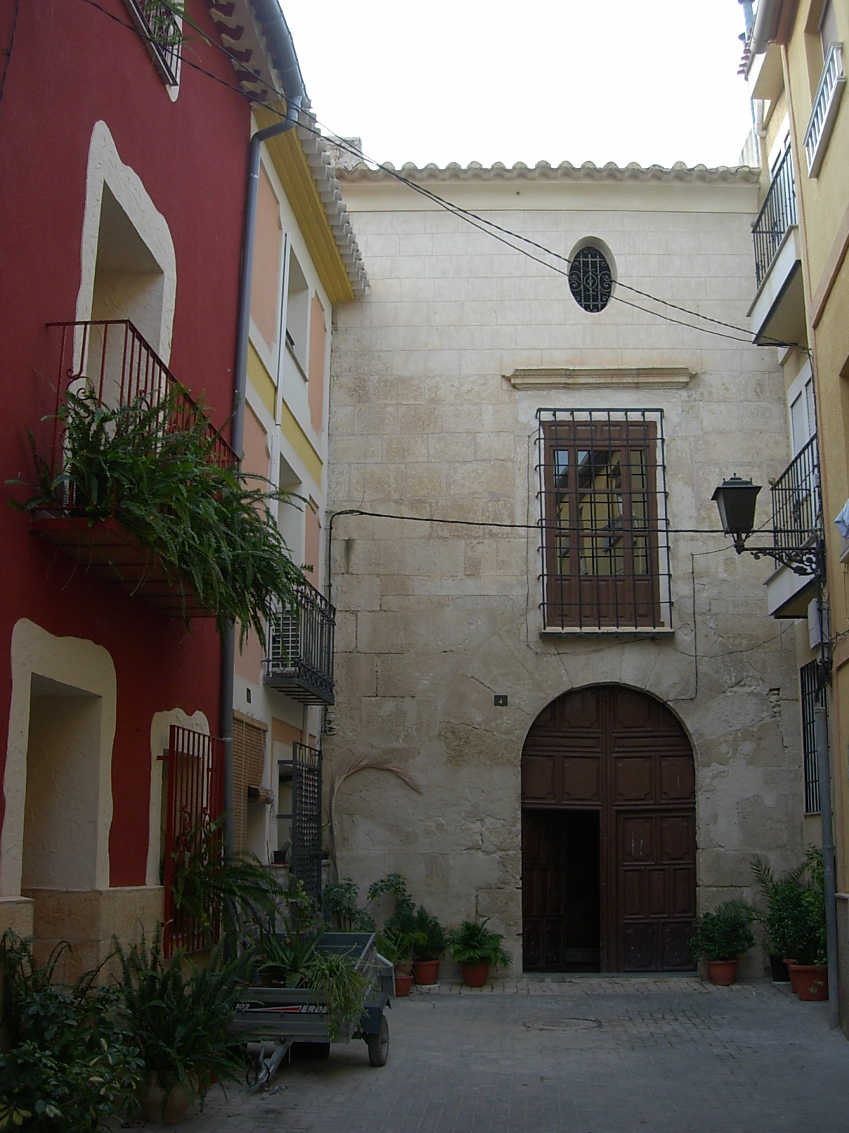 Ricote - Murcia - Spain